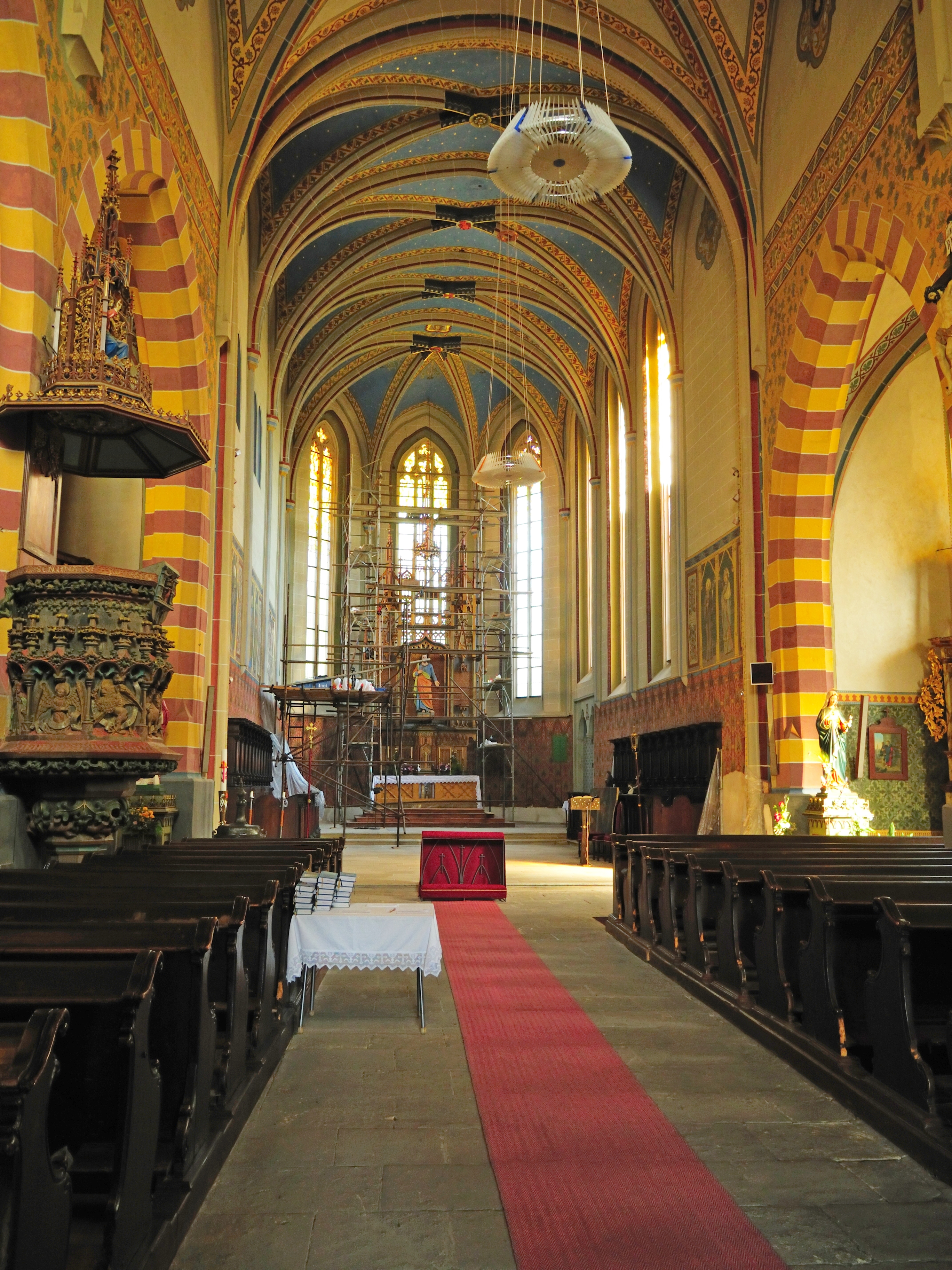 Kostel sv. Bartoloměje, Žižkovo náměstí, Rakovník